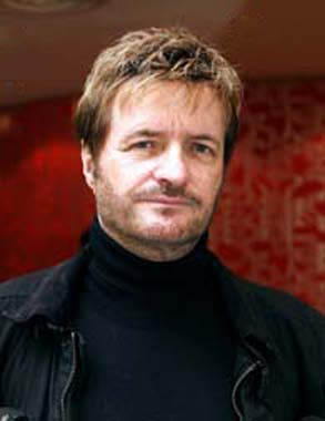 Portrait de Mario Litwin